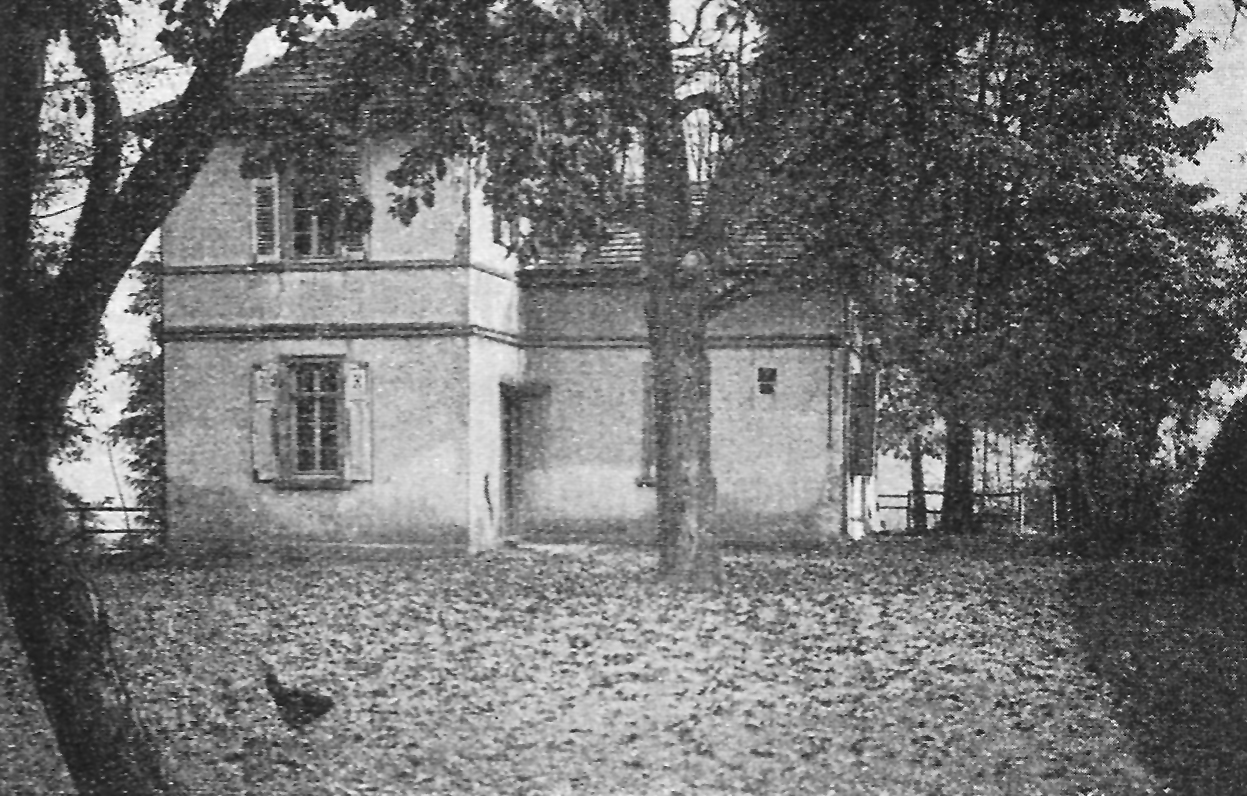 Sennhütte in Tübingen von außen